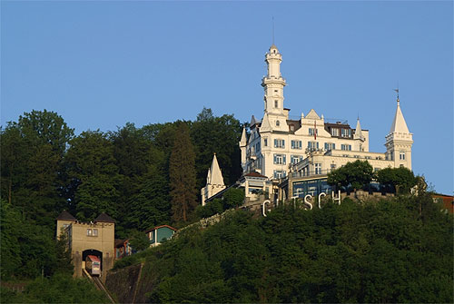 Gütsch (Luzern) (Nr. 03.1-4626)